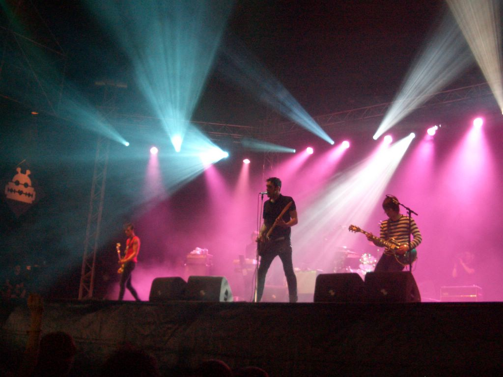 Unconditional.